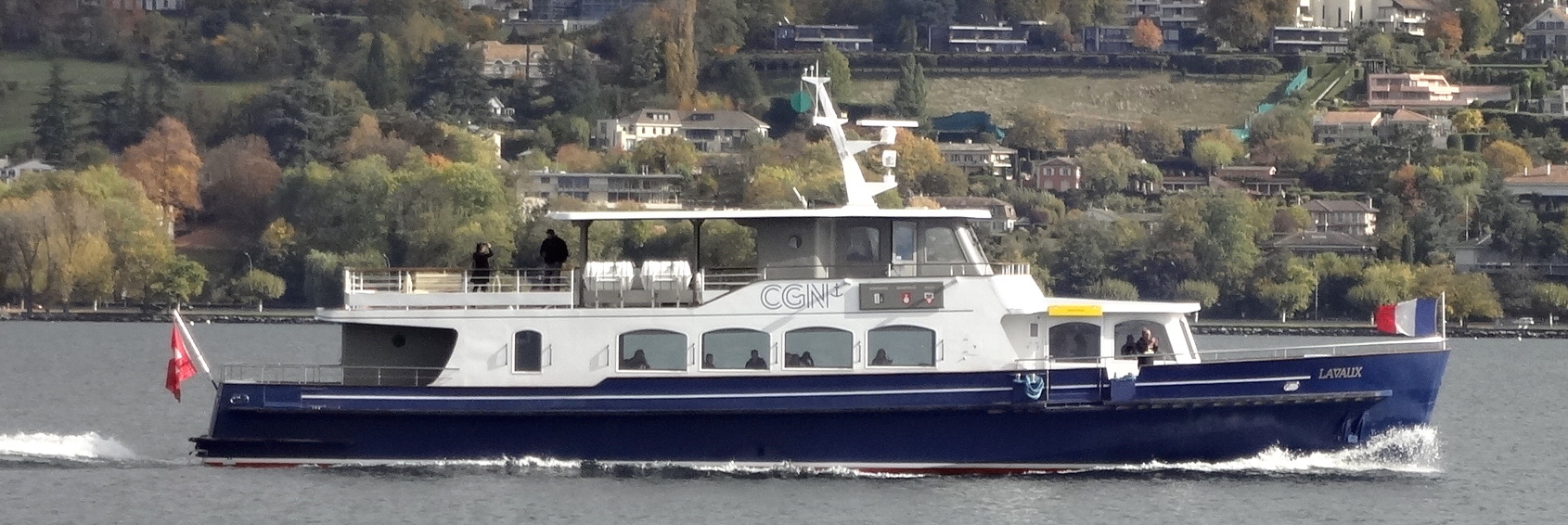 Le Lavaux dans le Petit-Lac, photographié depuis le quai Wilson aux Pâquis.